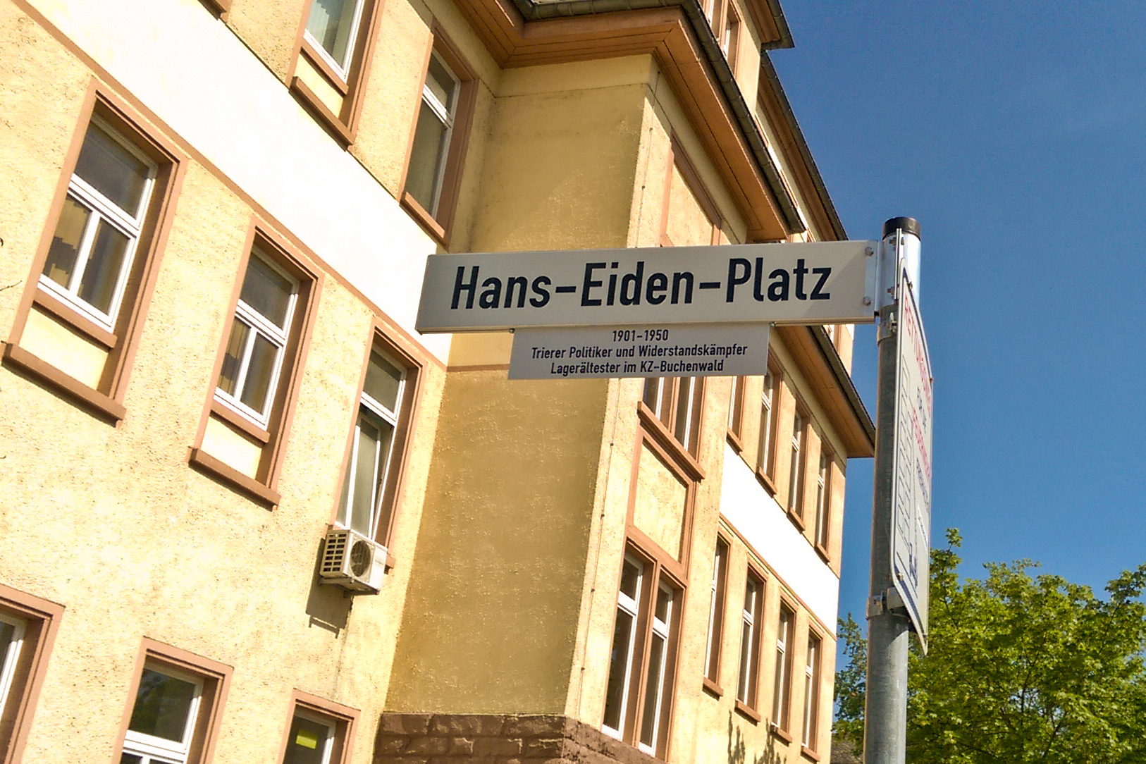 Der Platz vor dem Bürgerhaus Trier-Nord an der Franz-Georg-Straße erhielt im Februar 2020 den Namen „Hans-Eiden-Platz“. Der aus Trier-Nord stammende Hans Eiden (1901—1950) war Widerstandskämpfer gegen den Nationalsozialismus, Lagerältester im Konzentrationslager Buchenwald, und später Landtagsabgeordneter in Rheinland-Pfalz.